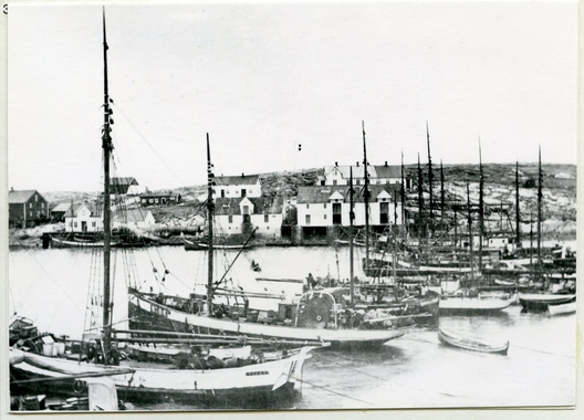 Fiskebåter ved havn i Nordøyan ca 1920-24. Ukjent fotograf. Unknown source: "Kystmuseet i Nord-Trøndelag"!